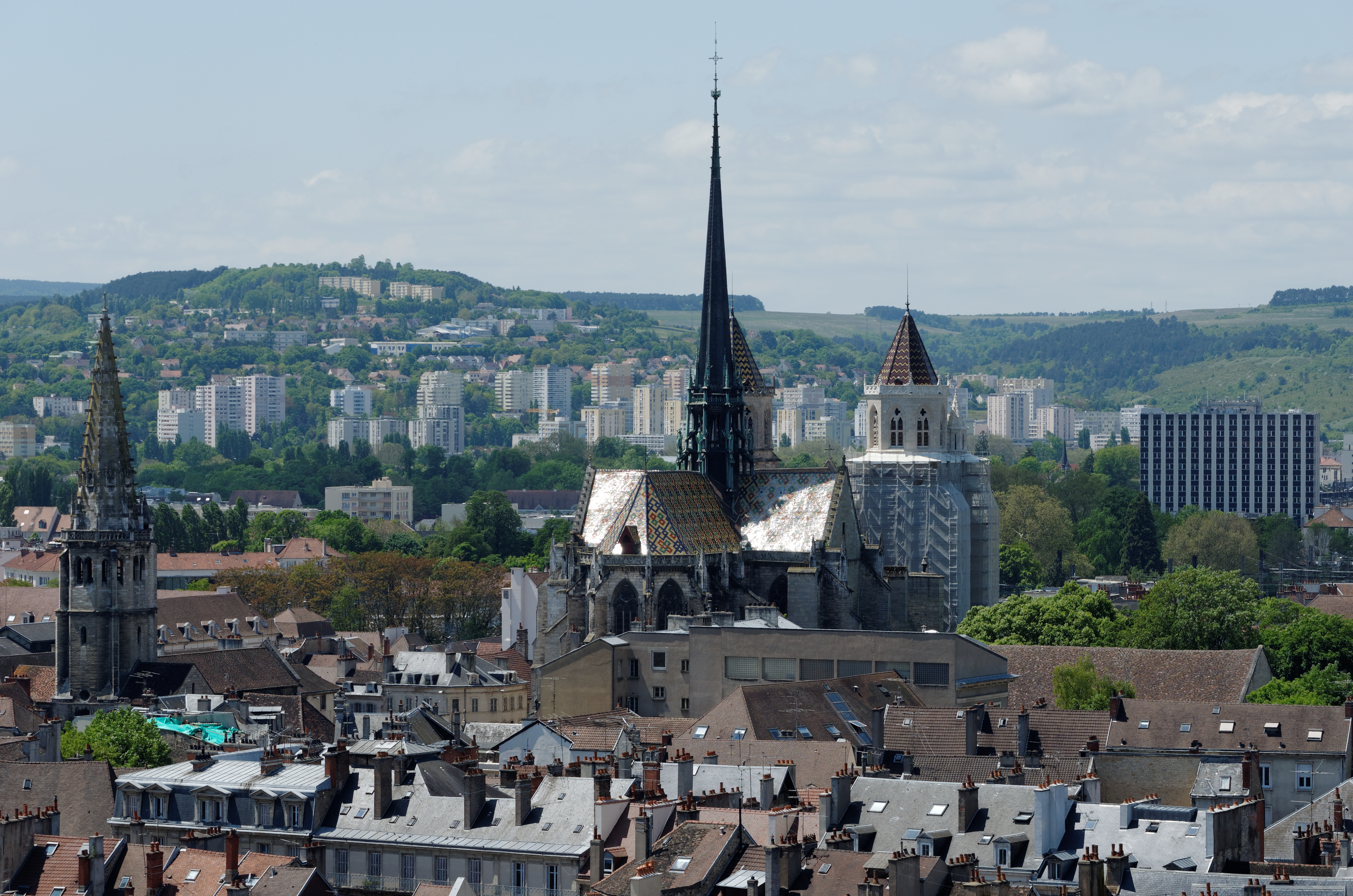 Vue de la Cathédrale Saint Bénigne et de l’Église Saint Philibert, depuis la tour Philippe le Bon, à Dijon